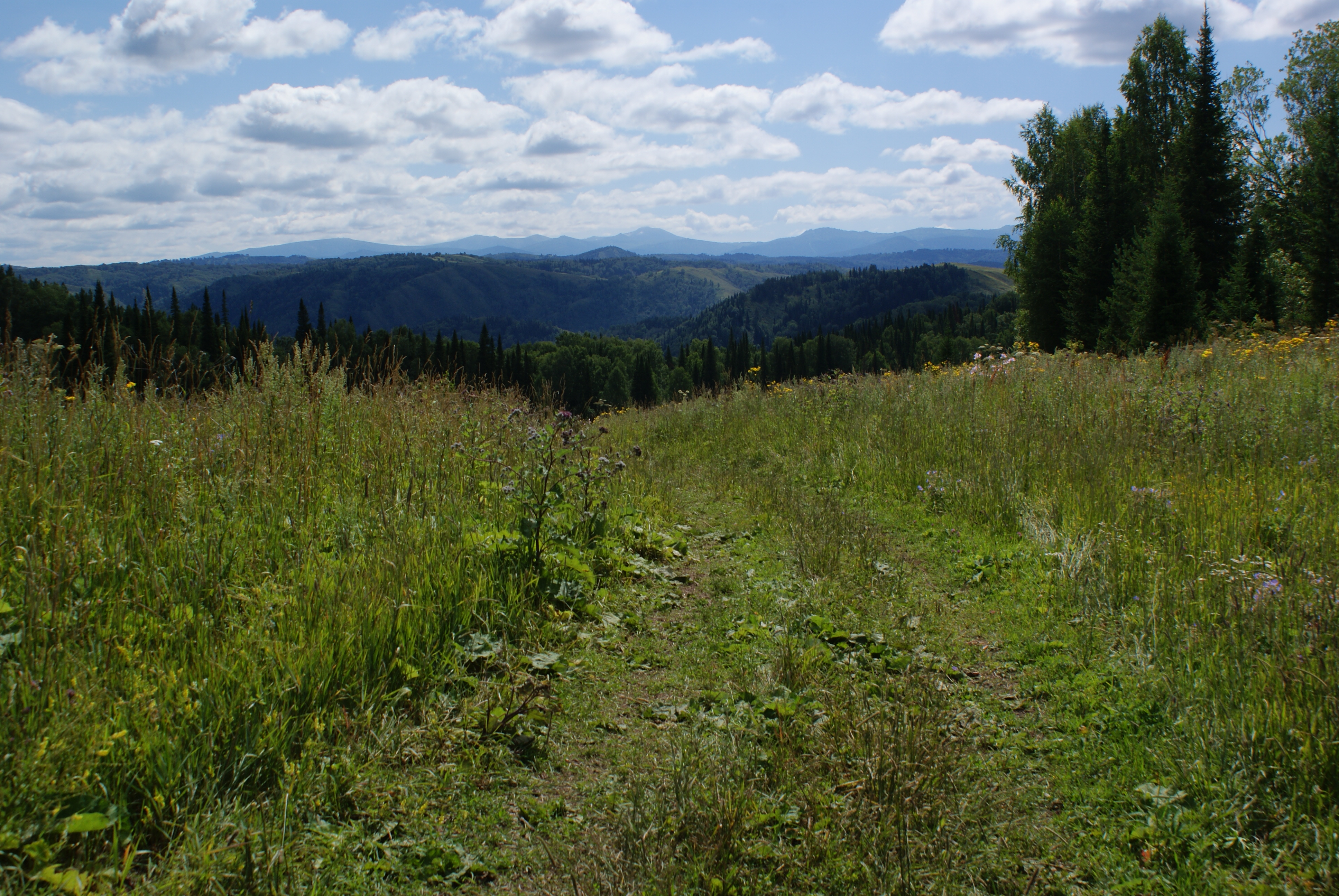 1 Перевал от Подпалатцев